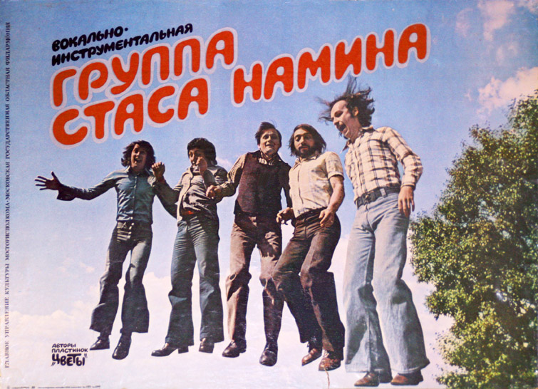 Группа "Цветы" Постер. Слева направо: К.Никольский, С.Намин, А.Слизунов, Ю.Фокин, А.Микоян